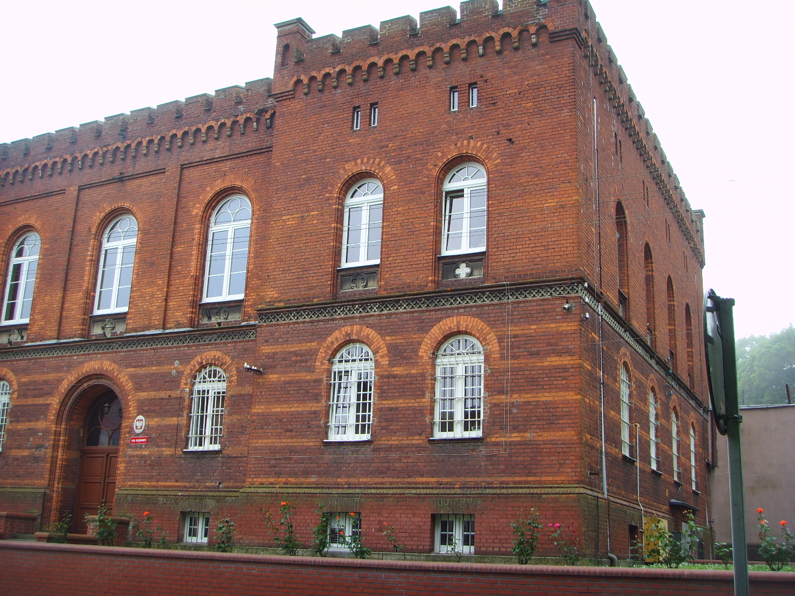 W tym budynku w latach 40 XX w był Powiatowy Urząd Bezpieczeństwa Publicznego w kamieniu Pomorskim. Obecnie Sąd Rejonowy